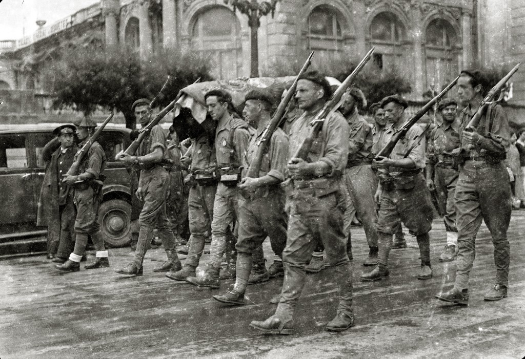 Título original: Entrada de las tropas nacionales en San Sebastián (42/54) Localización: San Sebastián (Guipúzcoa)